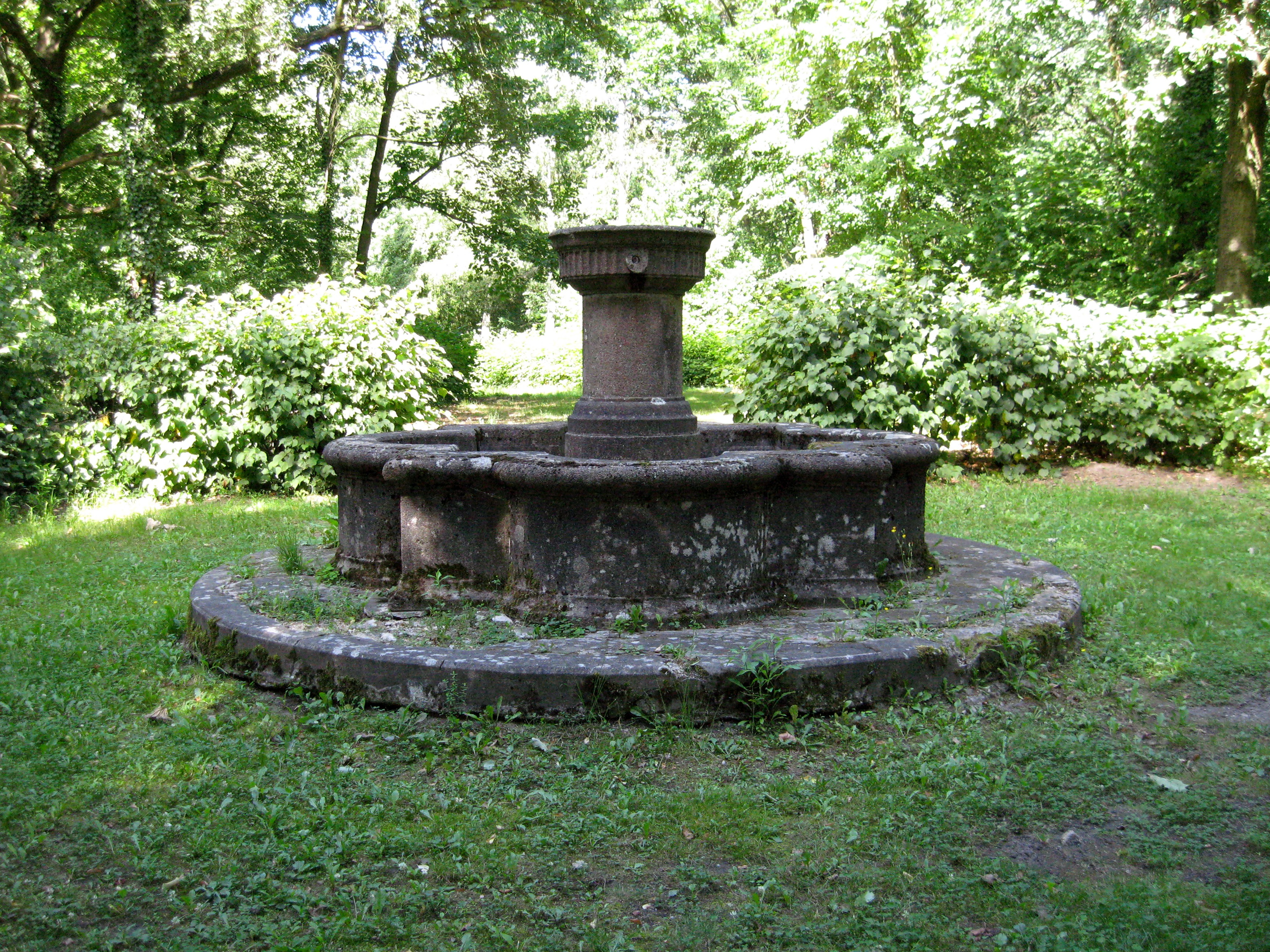 Brunnen östlich der Kapelle des Ostkirchhofs Ahrensfelde, Landkreis Barnim, Land Brandenburg, Deutschland